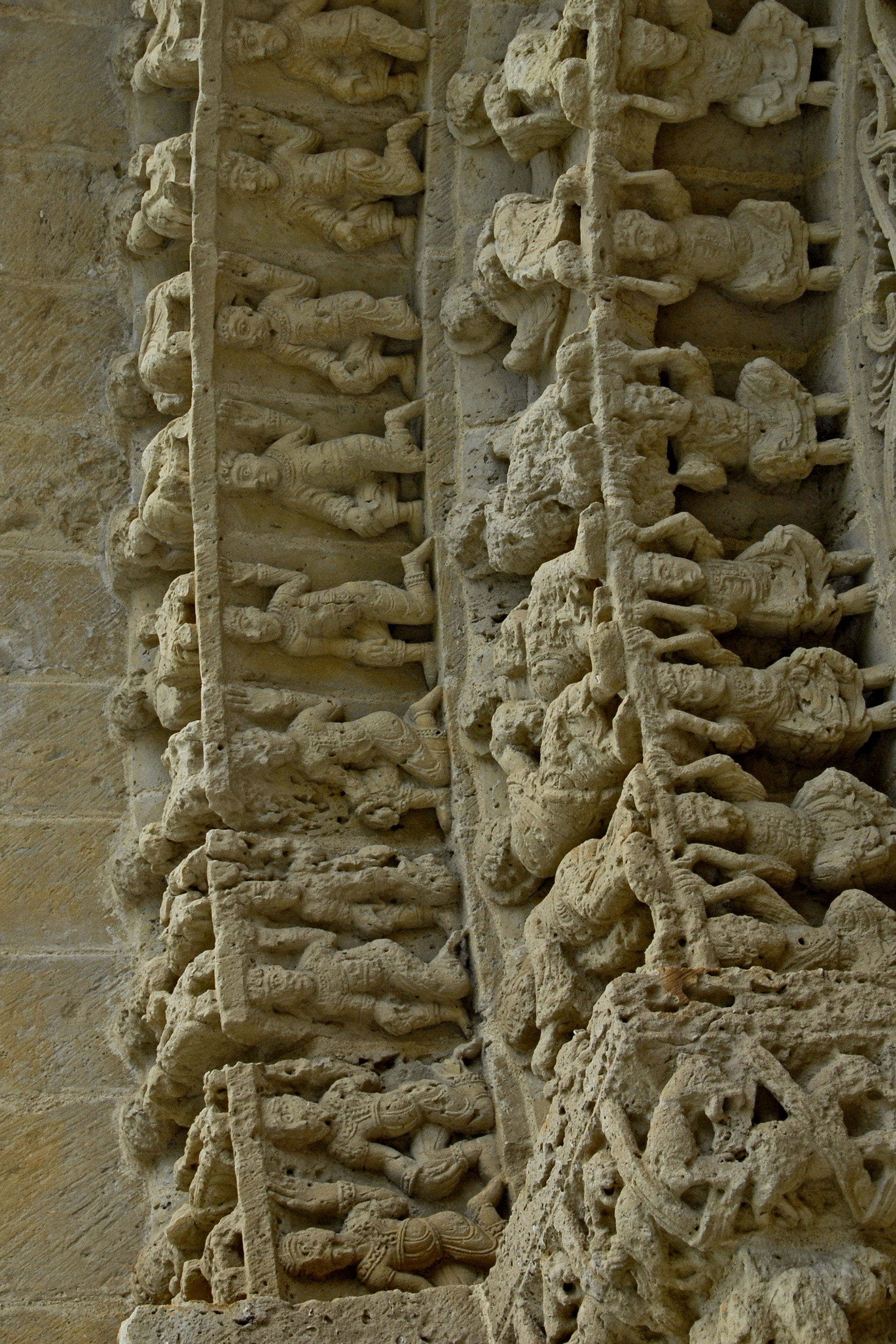 St.-Pierre Aulnay, Südportal, 2.+3. Bogen, links von innen